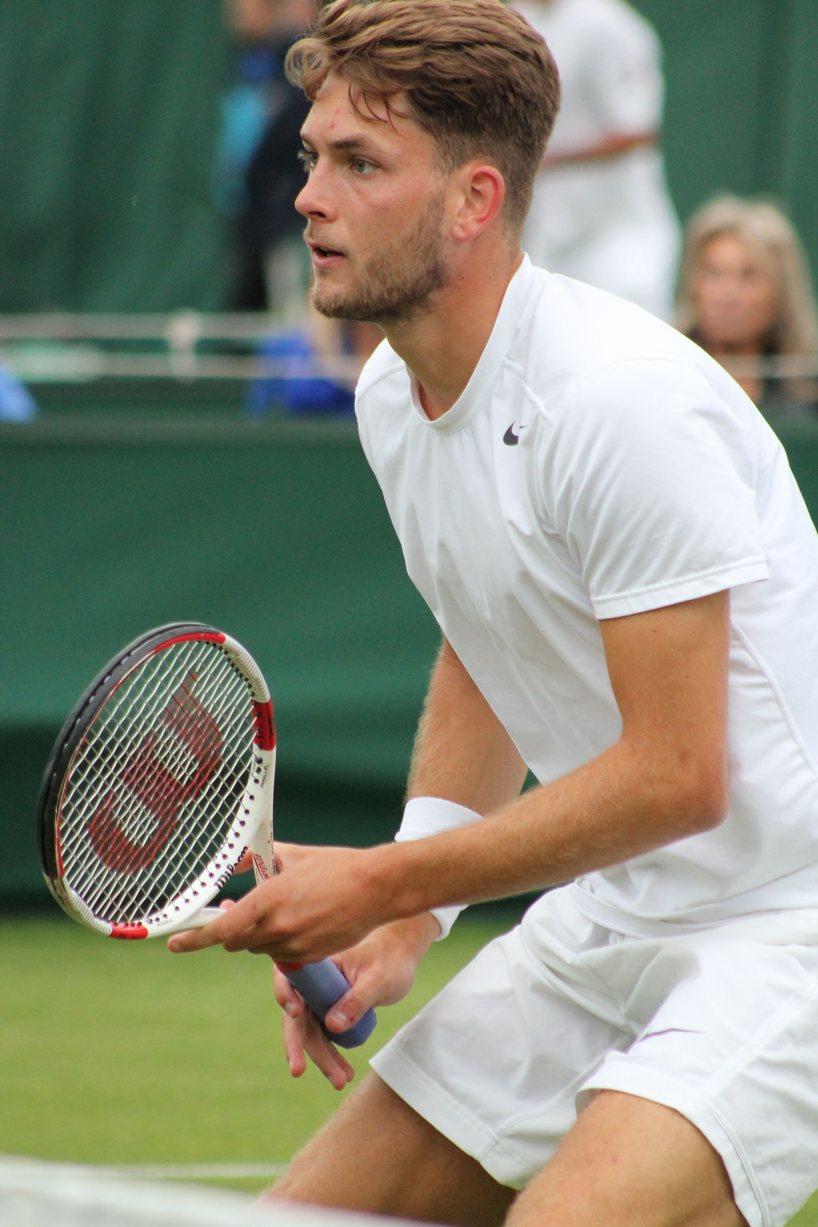 Burton WMQ14 (5)